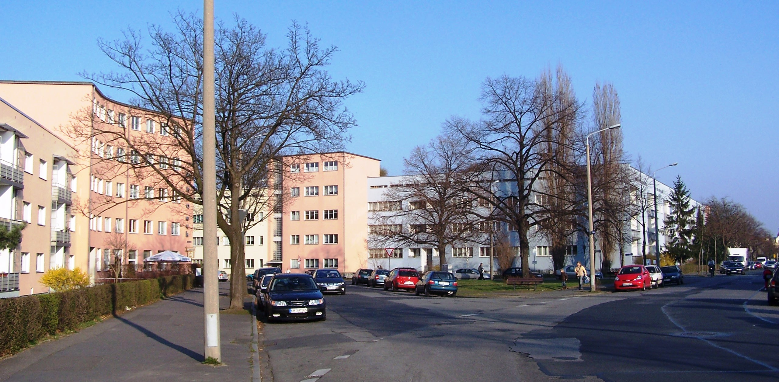 Großsiedlung Trachau in Dresden, Stil: Neue Sachlichkeit, Architekten: Hans Richter, Hans Waloschek, Schilling & Graebner, Carl Rade (Maler), Ernst Ufer, Willimartin Romberger